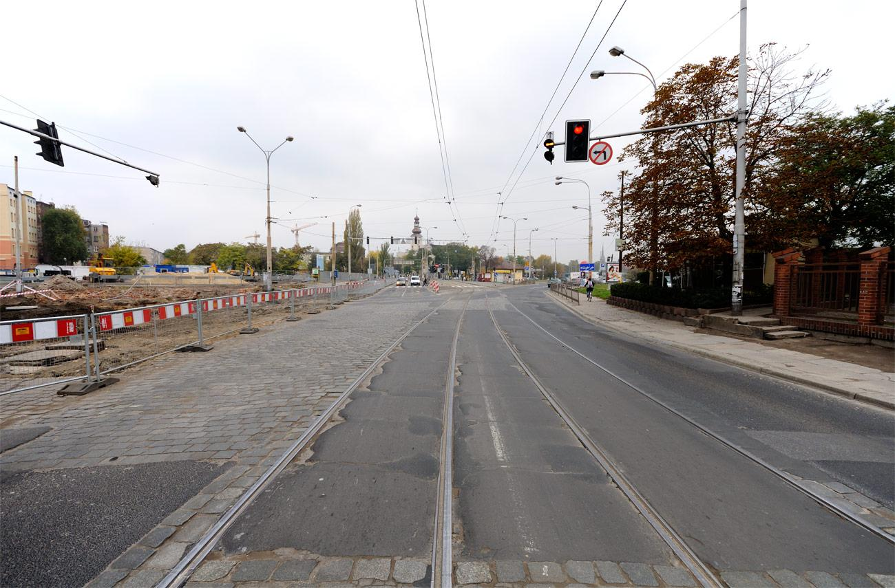 Strassenkreuzung der ul. Romualda Traugutta (vormals Klosterstrasse) und der ul. K. Pułaskiego, (vormals Brüderstrasse), Wrocław (vormals Breslau), Niederschlesien, Polen.